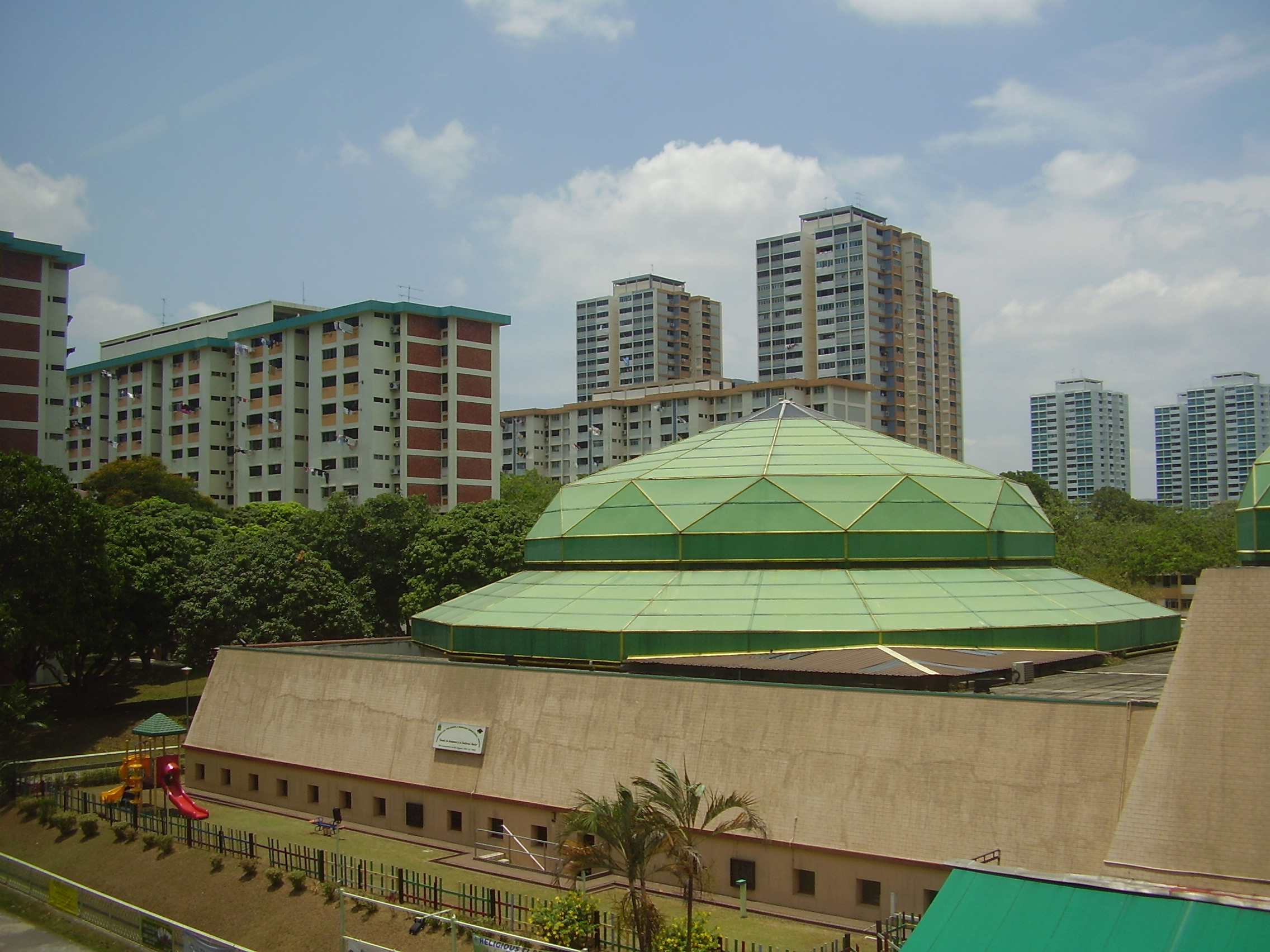 A mosque in Clementi estate.